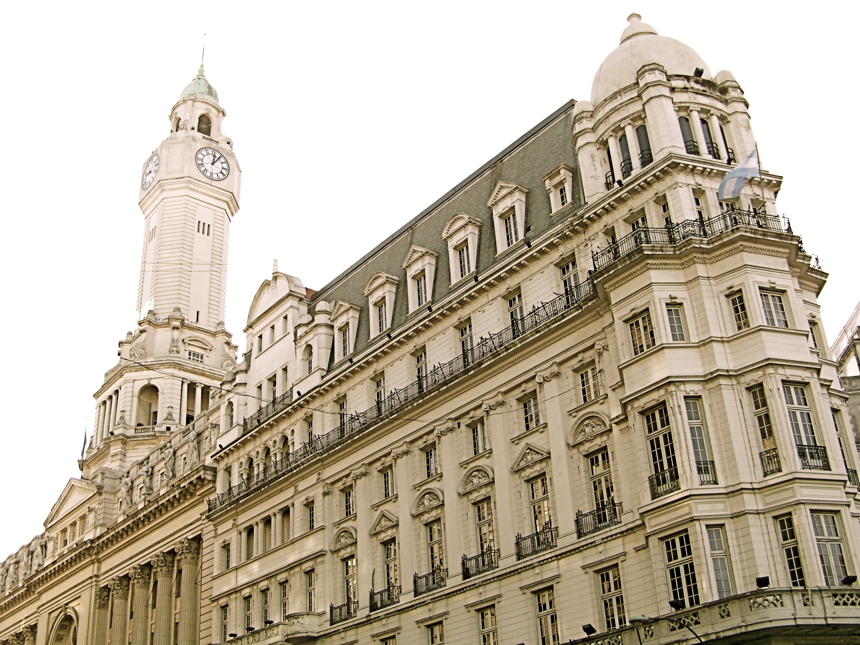 Buenos Aires Municipal Legislature